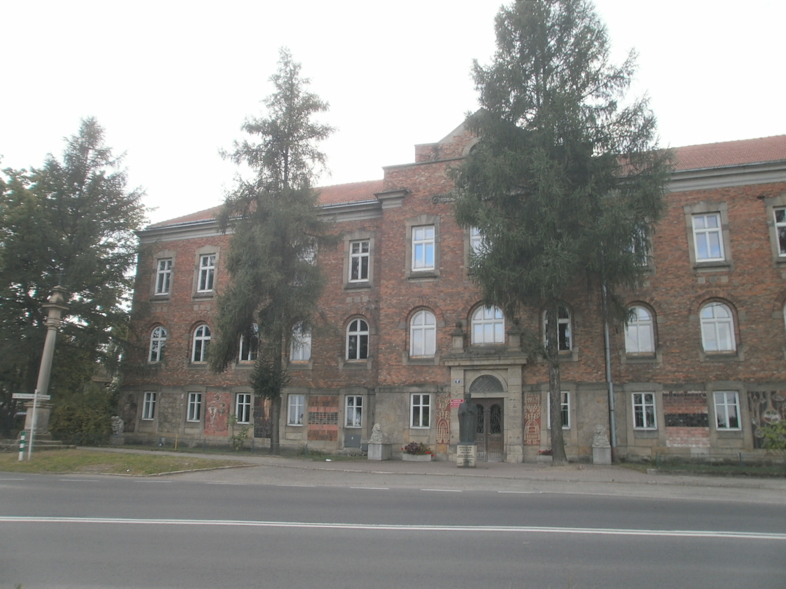 budynek Liceum Sztuk Plastycznych Nowy Wiśnicz, ul. Grunwaldzka 278, Nowy Wiśnicz